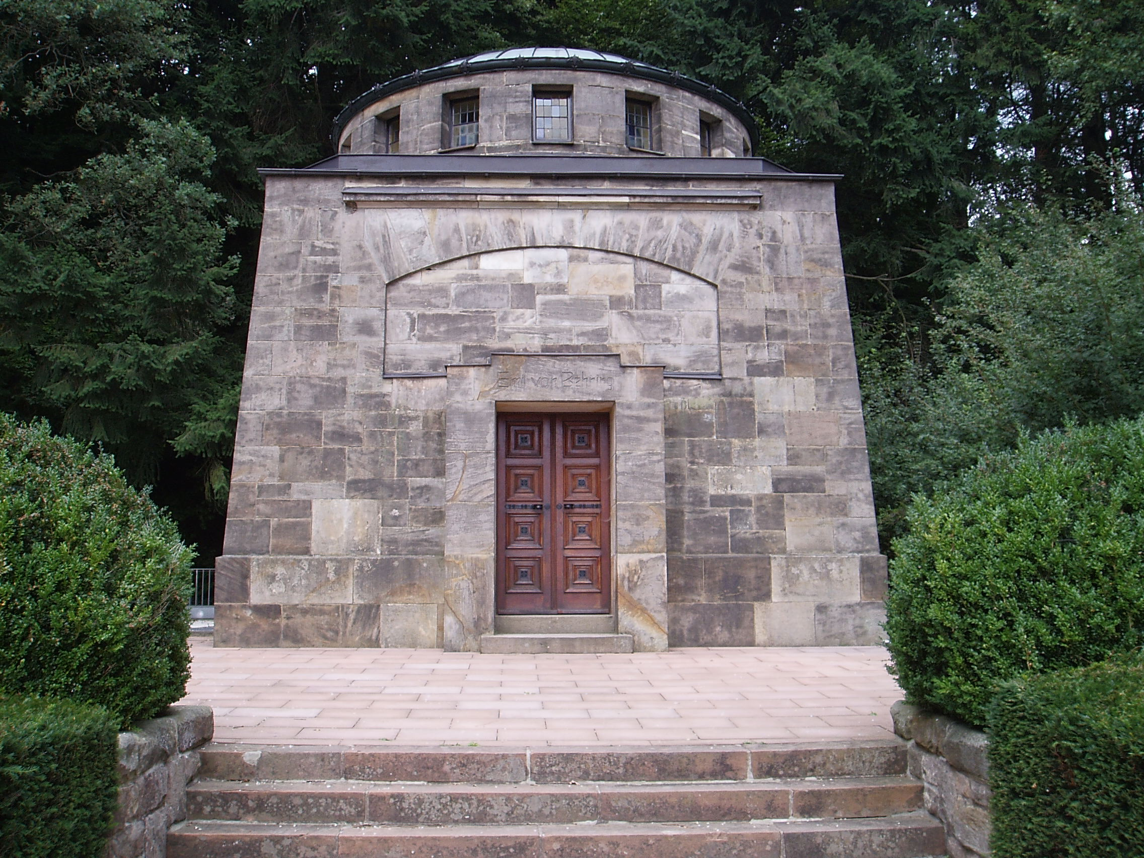 Zu sehen ist die Front des Behring-Mausoleums